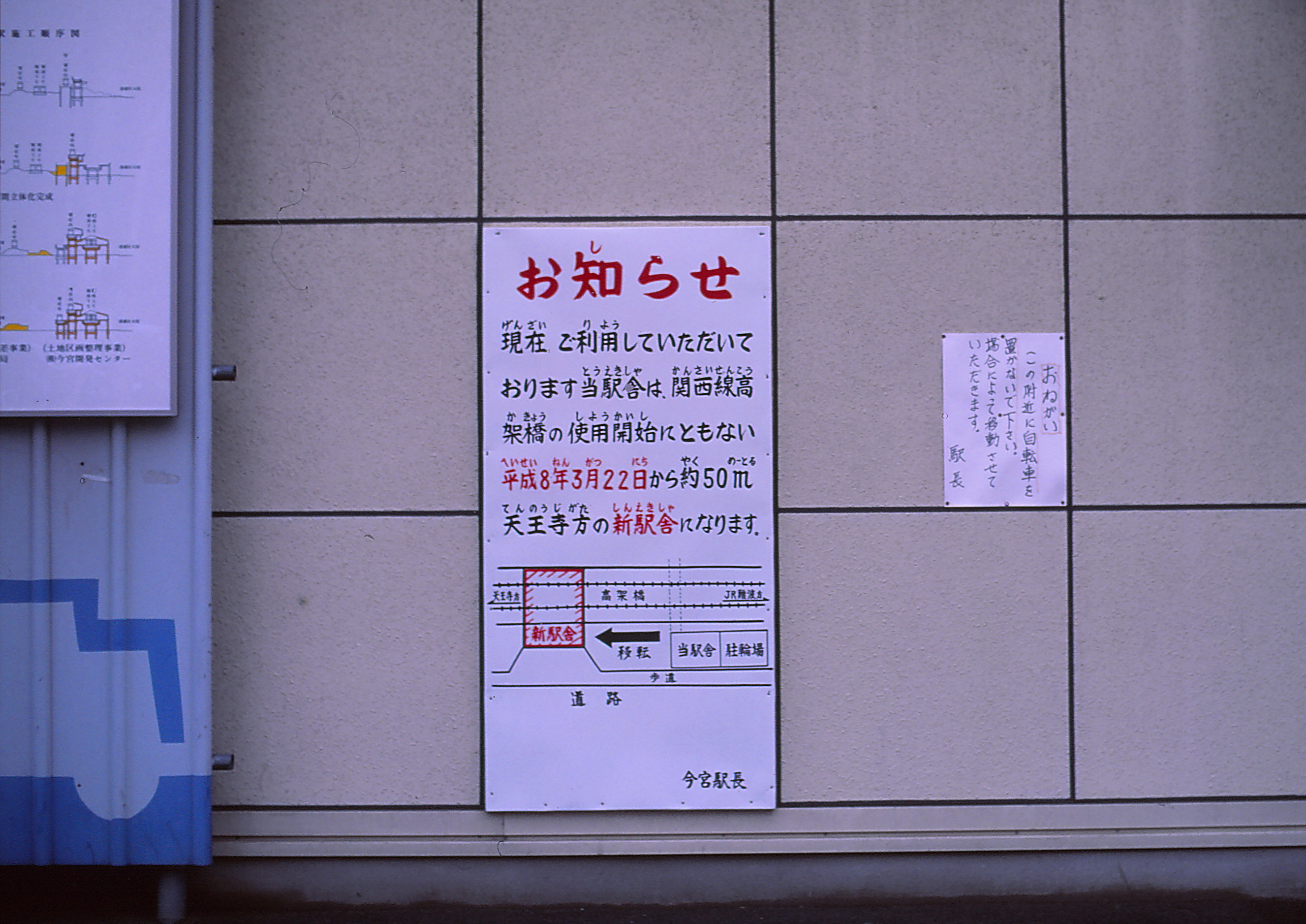 JR今宮駅 高架に伴う告知看板